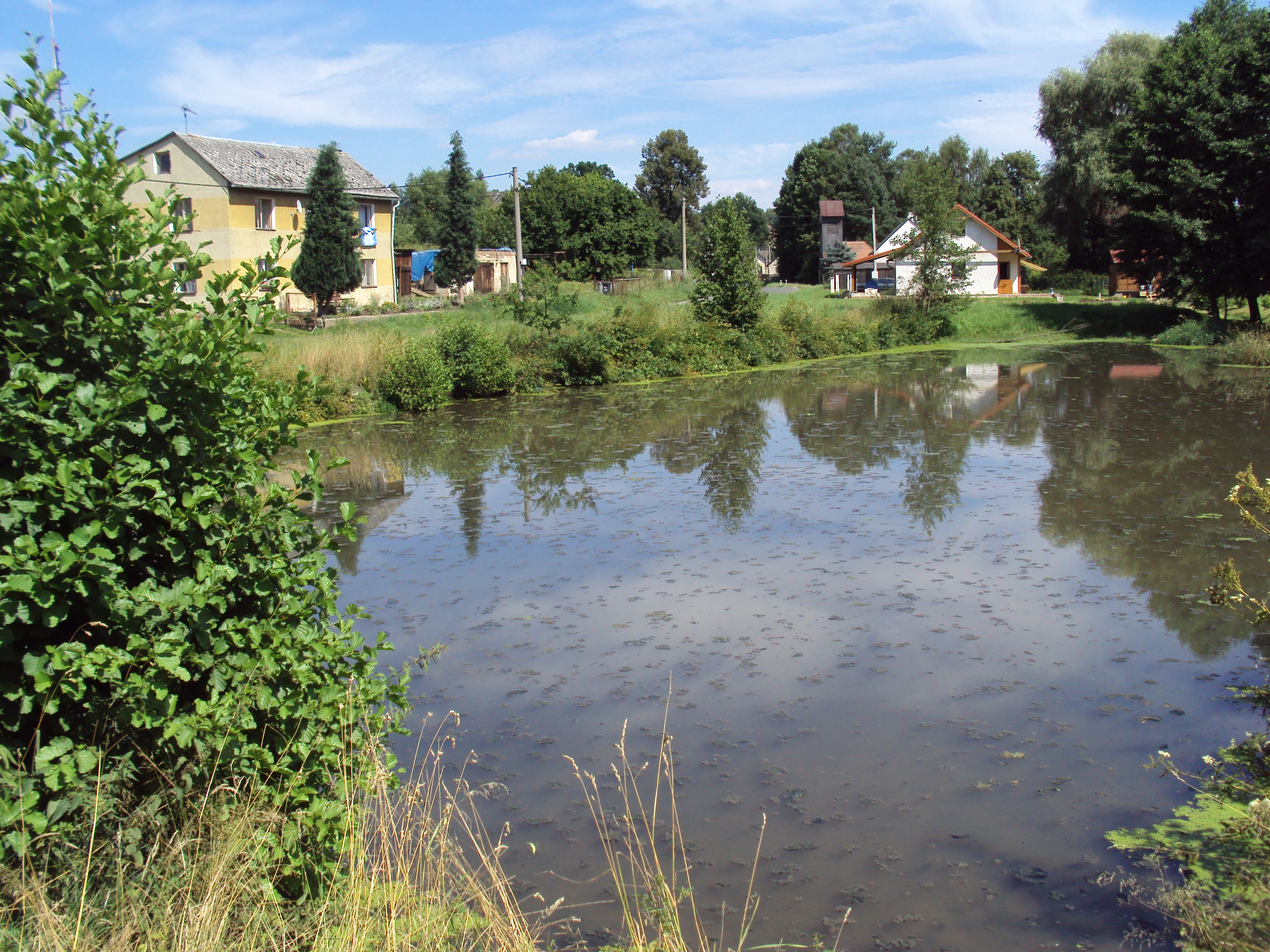 Požární nádrž na potoce Kamenice ve středu obce